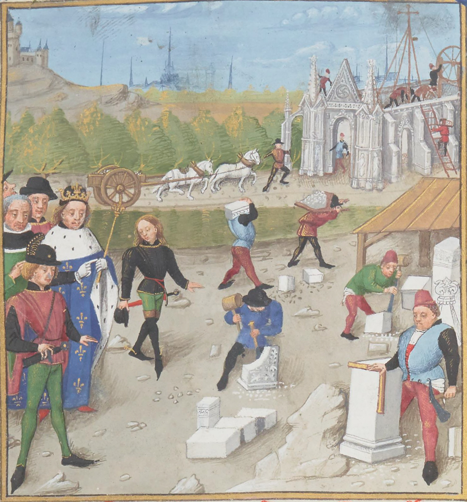 Dagobert visitant le chantier de la construction de Saint-Denis. Robinet Testard. Les Grandes Chroniques de France. France, Poitiers, XVe siècle. Paris, Bibliothèque nationale de France, Département des manuscrits Français 2609, Grandes Chroniques de France, folio 60 v°. RCB 10089.